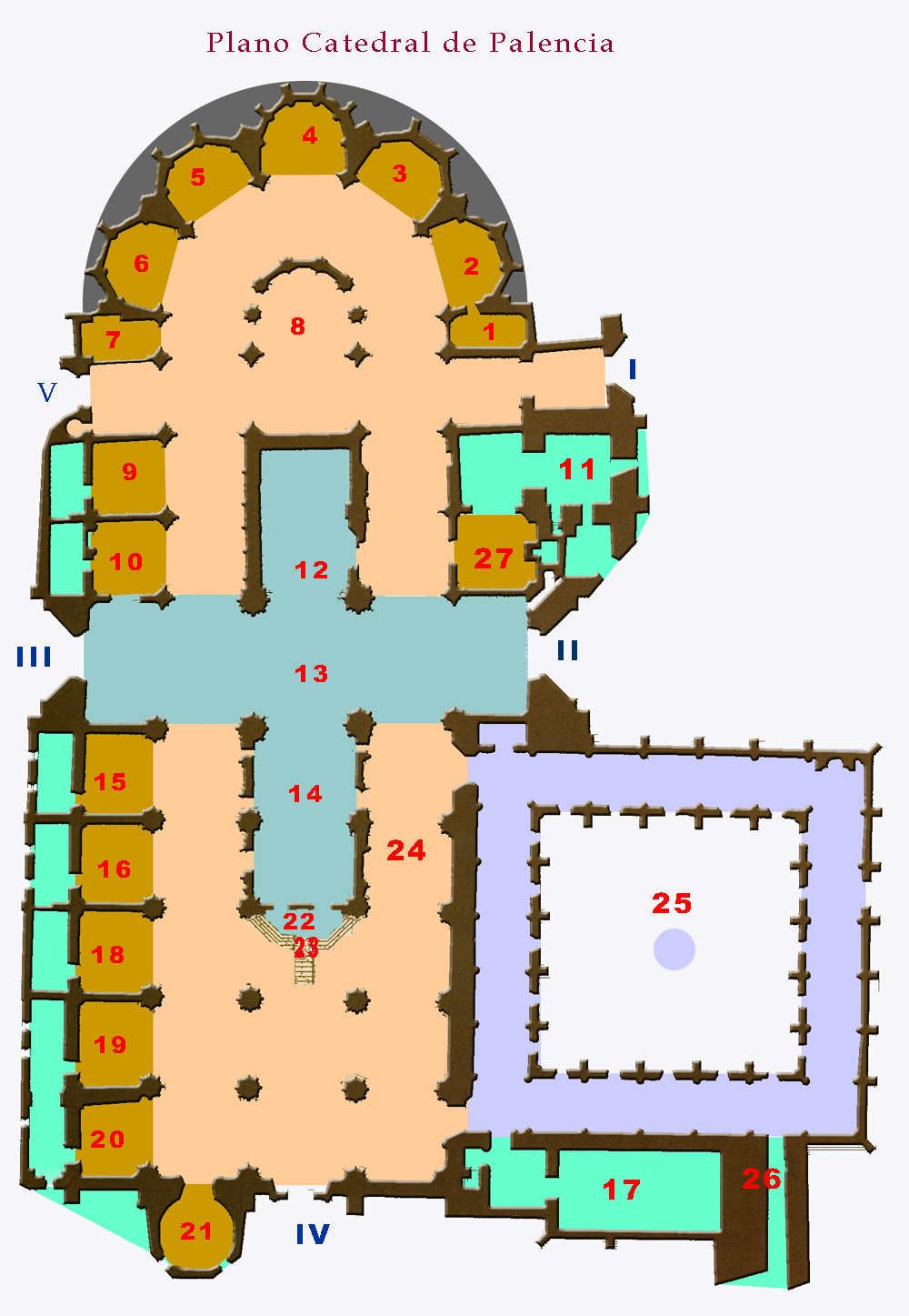 Planta de la catedral de Palencia - España Reproducción realizada por user:papix